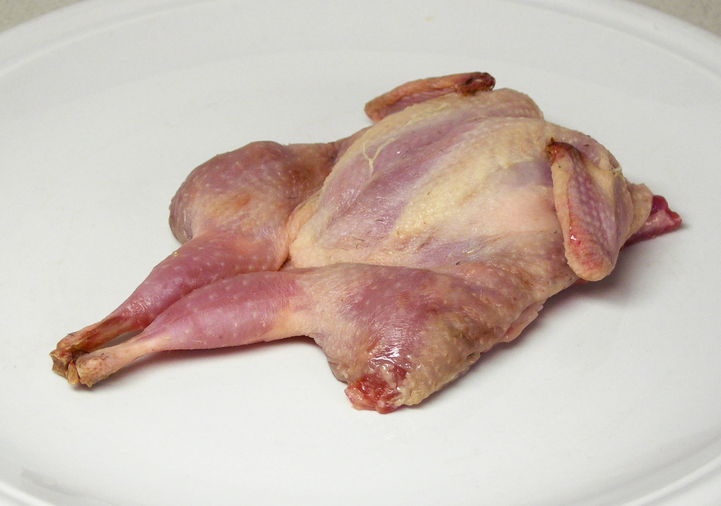 Ausgenommene rohe Wachtel, zum Braten aufgeklappt (en crapaudine)